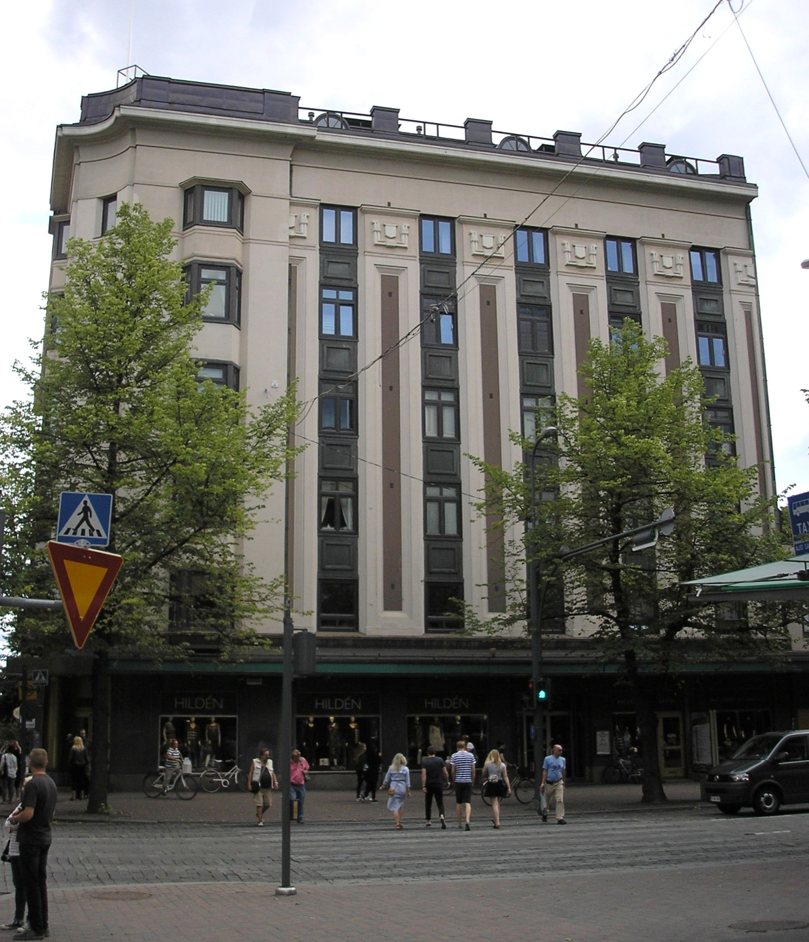 Hämeenkatu 29 Tampereella Hämeenkadun ja Näsilinnankadun risteyksessä. Kuvattu Hämeenkadun toiselta puolelta.